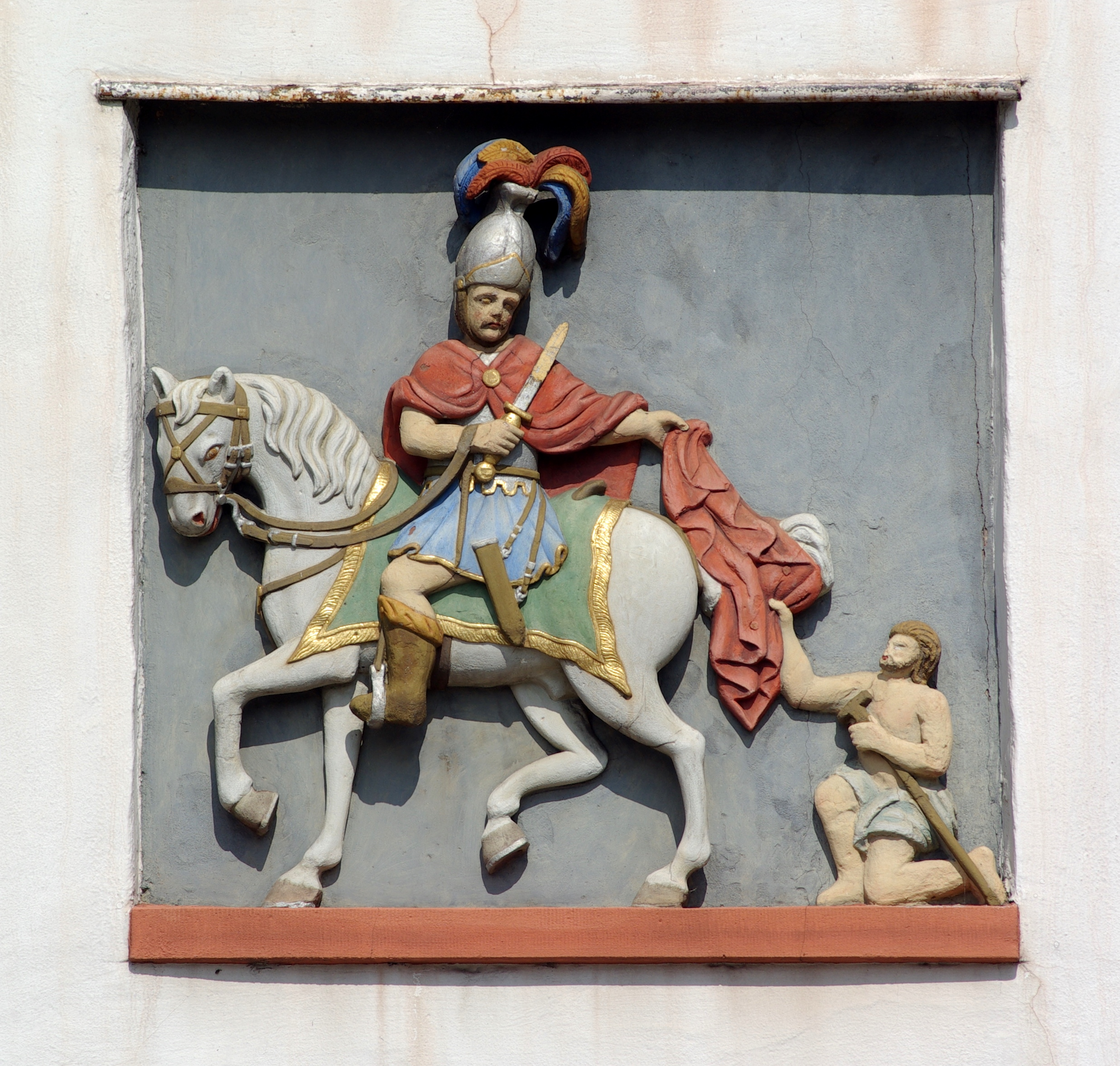 Trier, Darstellung des Heilgen Martin am Martinskloster